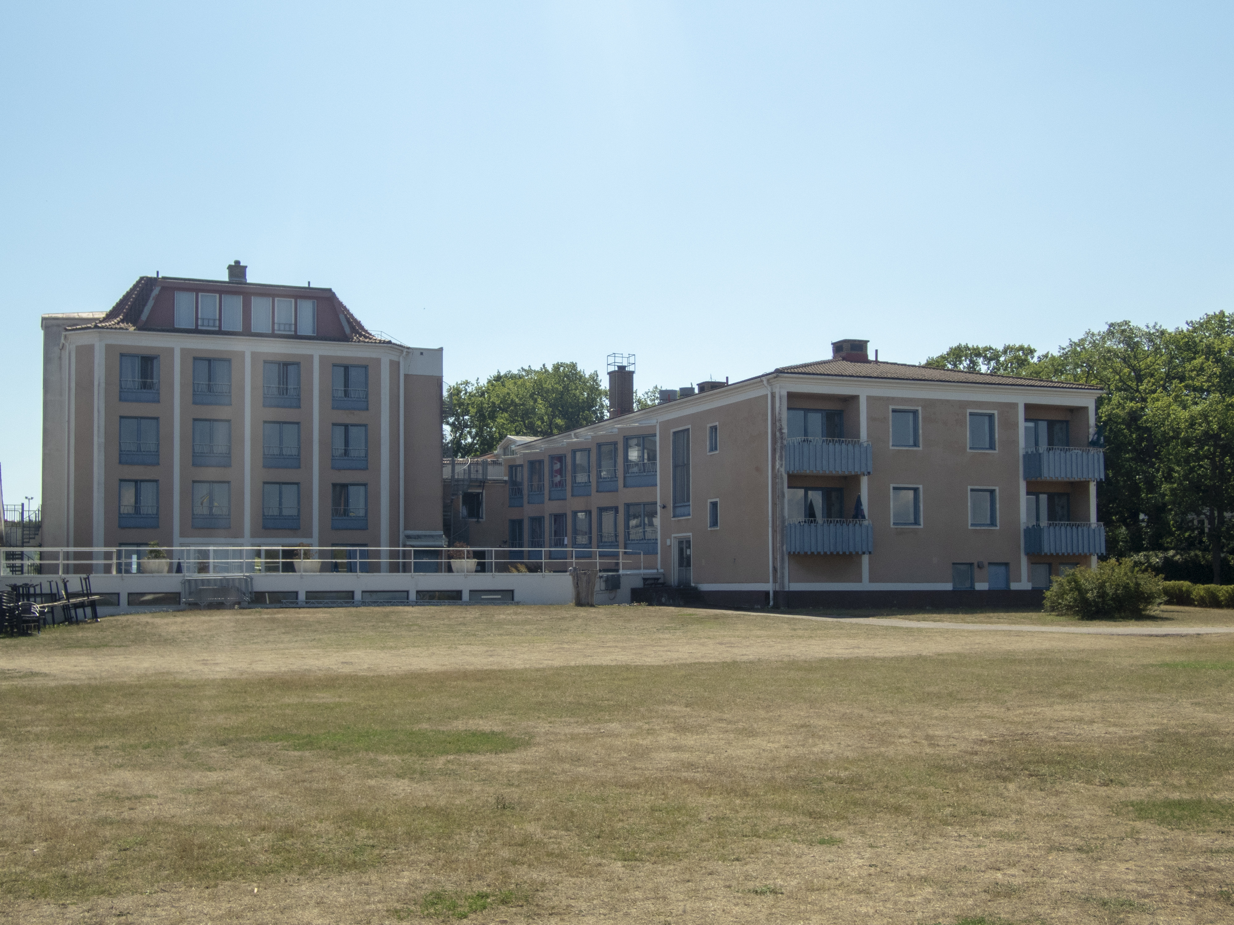 Strand Hotell, Borgholm. Äldre delen byggd 1952. Arkitekt Gösta Gerdsiö